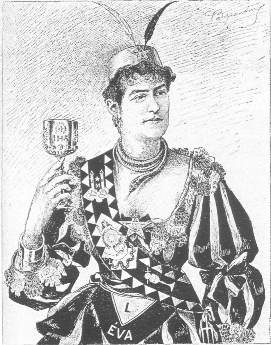 Portrait de Sophia Walder publié dans La femme et l'enfant dans la franc-maçonnerie universelle d'Abel Clarin de la Rive